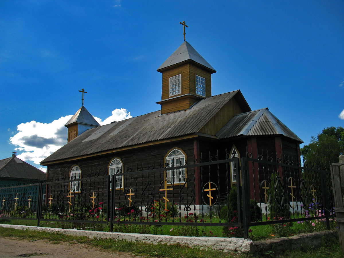 Беларуская (тарашкевіца): Плешчаніцы (Pleščanicy)